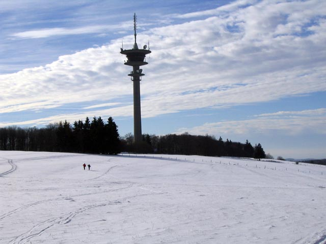 36286 Neuenstein, Eisenberg, author: Sebastian Hemel